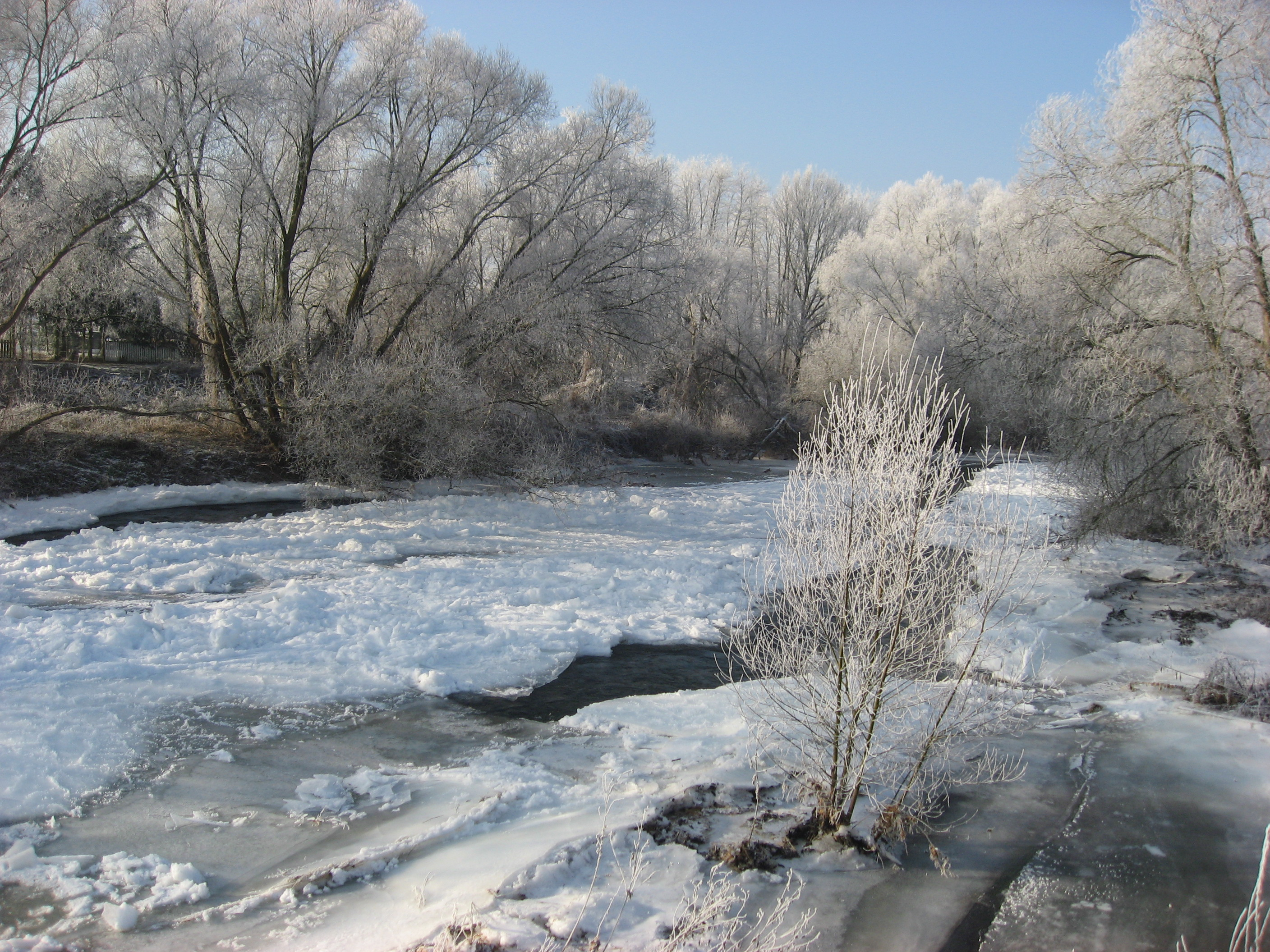 Au sud de la commune